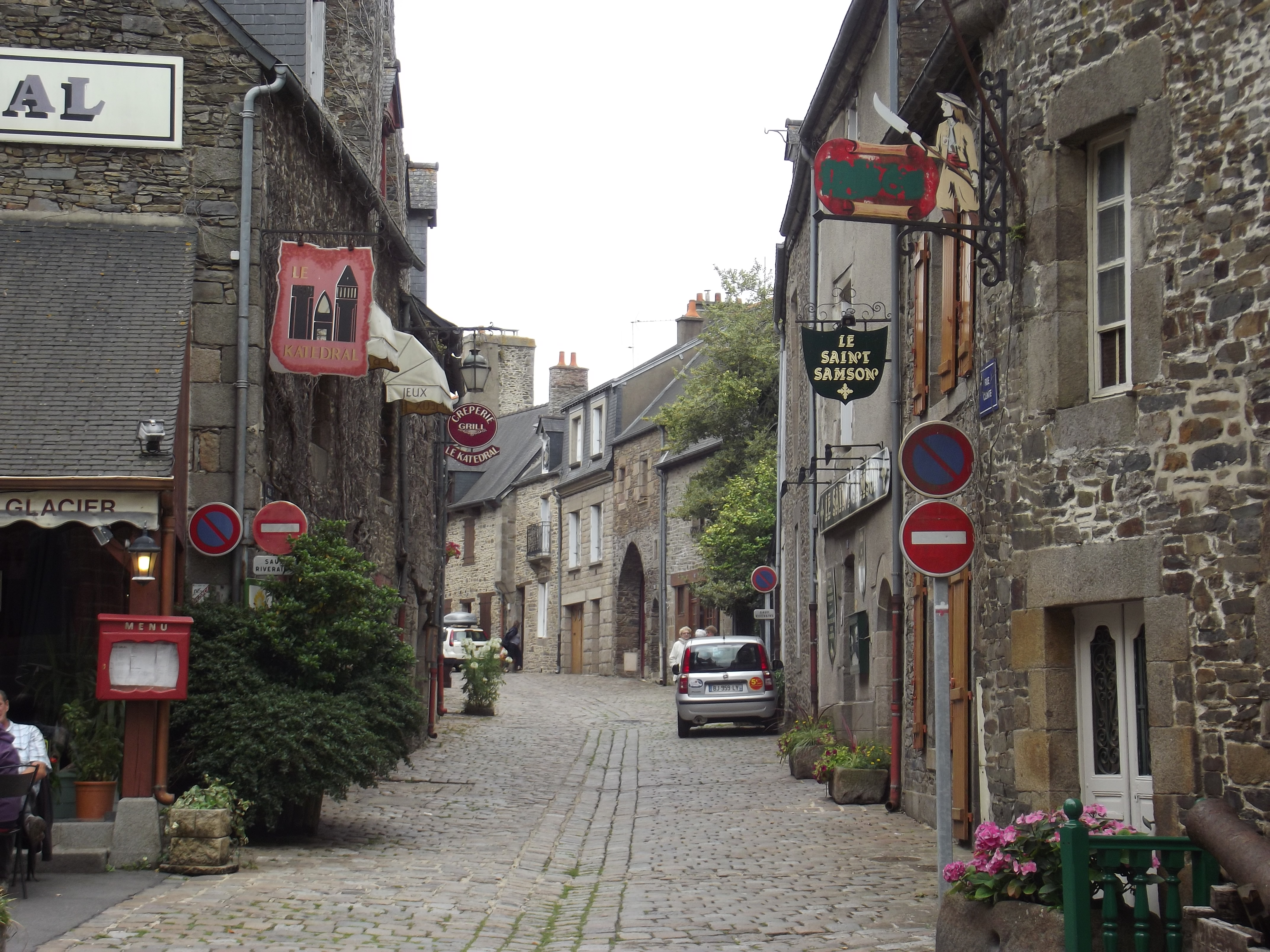 La rue Ceinte dans la cité médiévale de Dol-de-Bretagne (Ille-et-Vilaine), France